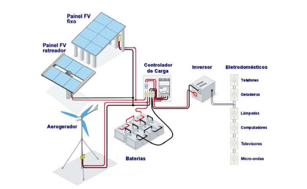 Fontes de corrente atuais